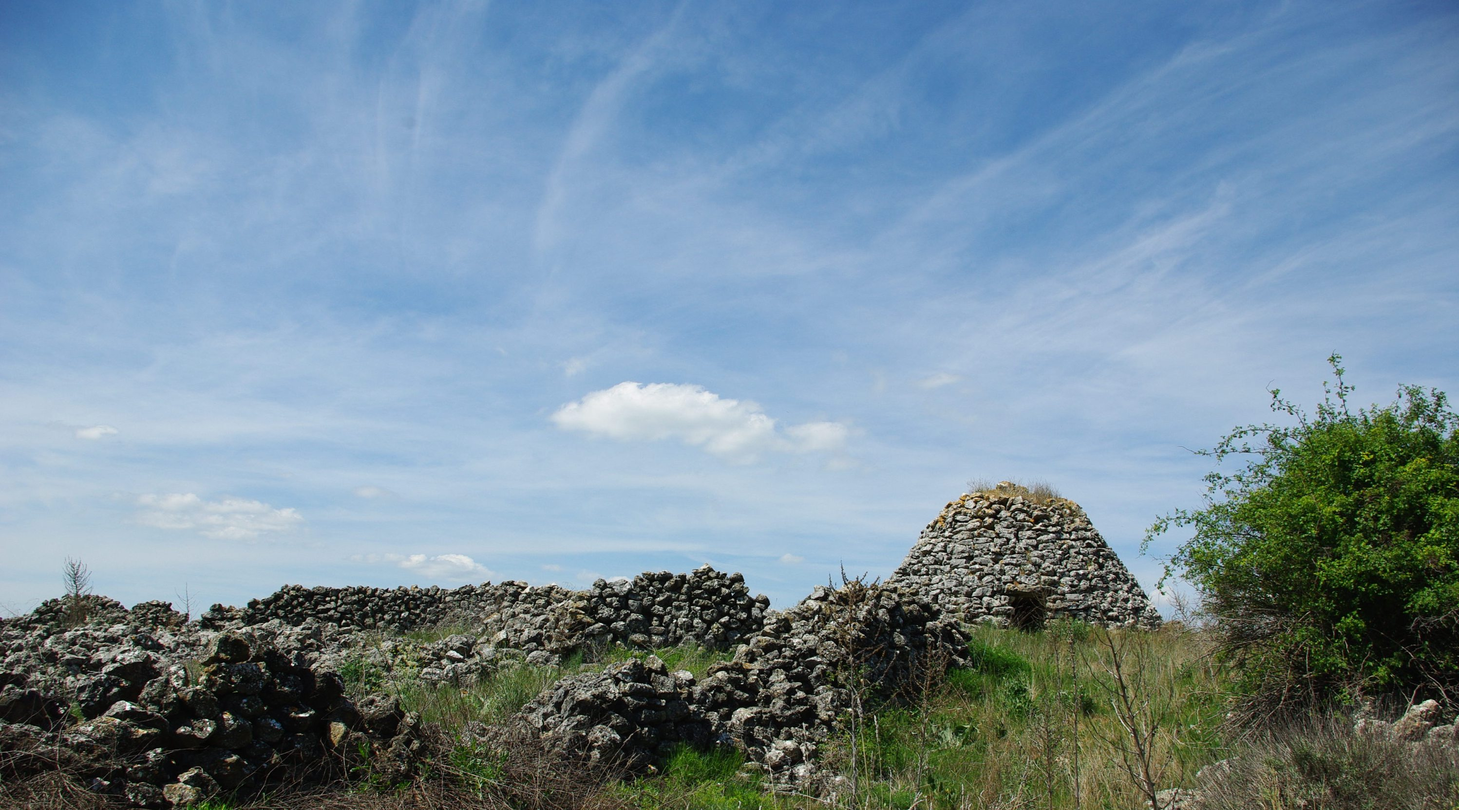 Casetas utilizadas para la trashumancia de los pastores, ya en desuso.